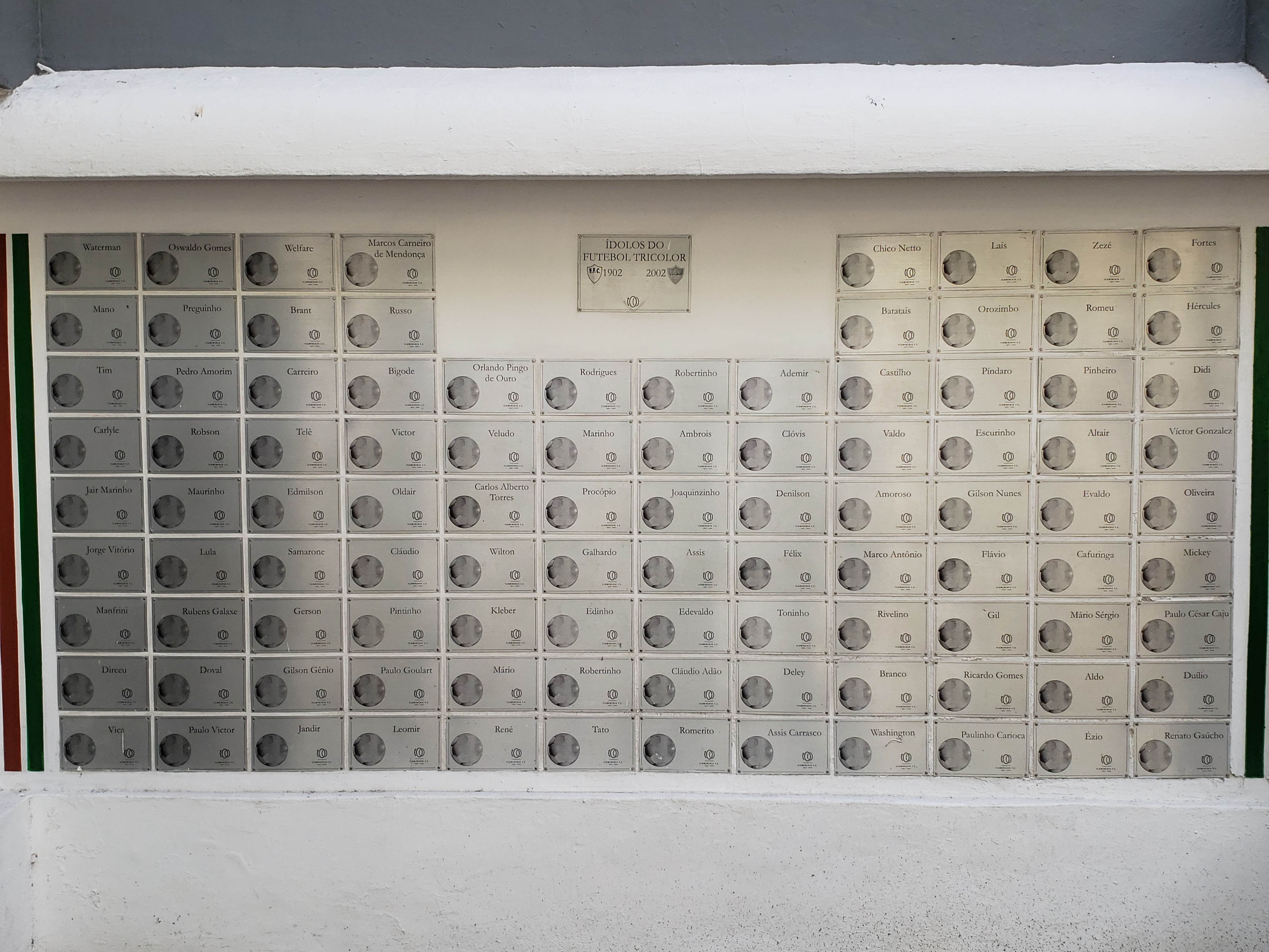 Ídolos do Fluminense Football Club homenageados pelo clube.